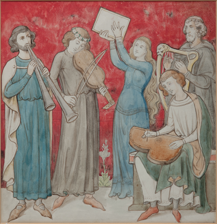 Ontwerp voor één van de panelen van een archiefkast, ontworpen door Pierre Cuypers en uitgevoerd door het atelier Cuypers en Stoltzenberg en de schilder Joseph Johan Hubert Lücker (zie File:Archiefkast Pierre Cuypers.jpg). De bovenste rij paneeldeuren heeft voorstellingen van de vrije kunsten (astronomie, rekenkunde, wiskunde, retorica, poëzie, en muziek). De onderste rij deuren stelt voor de geboden kunsten (beeldhouwkunst, bouwkunst en schilderkunst).